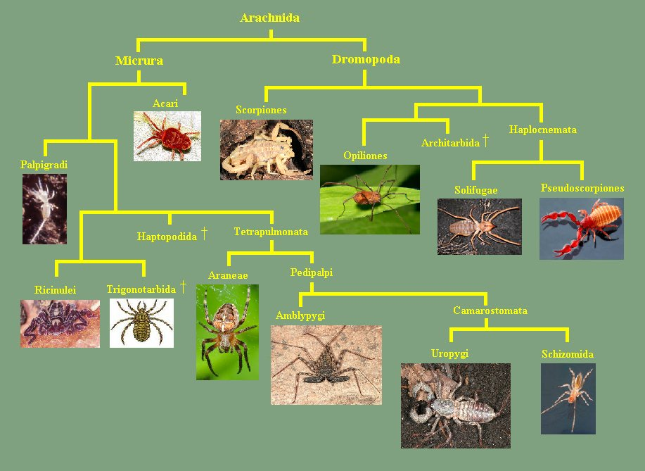 Arachnida (arbre en photos)